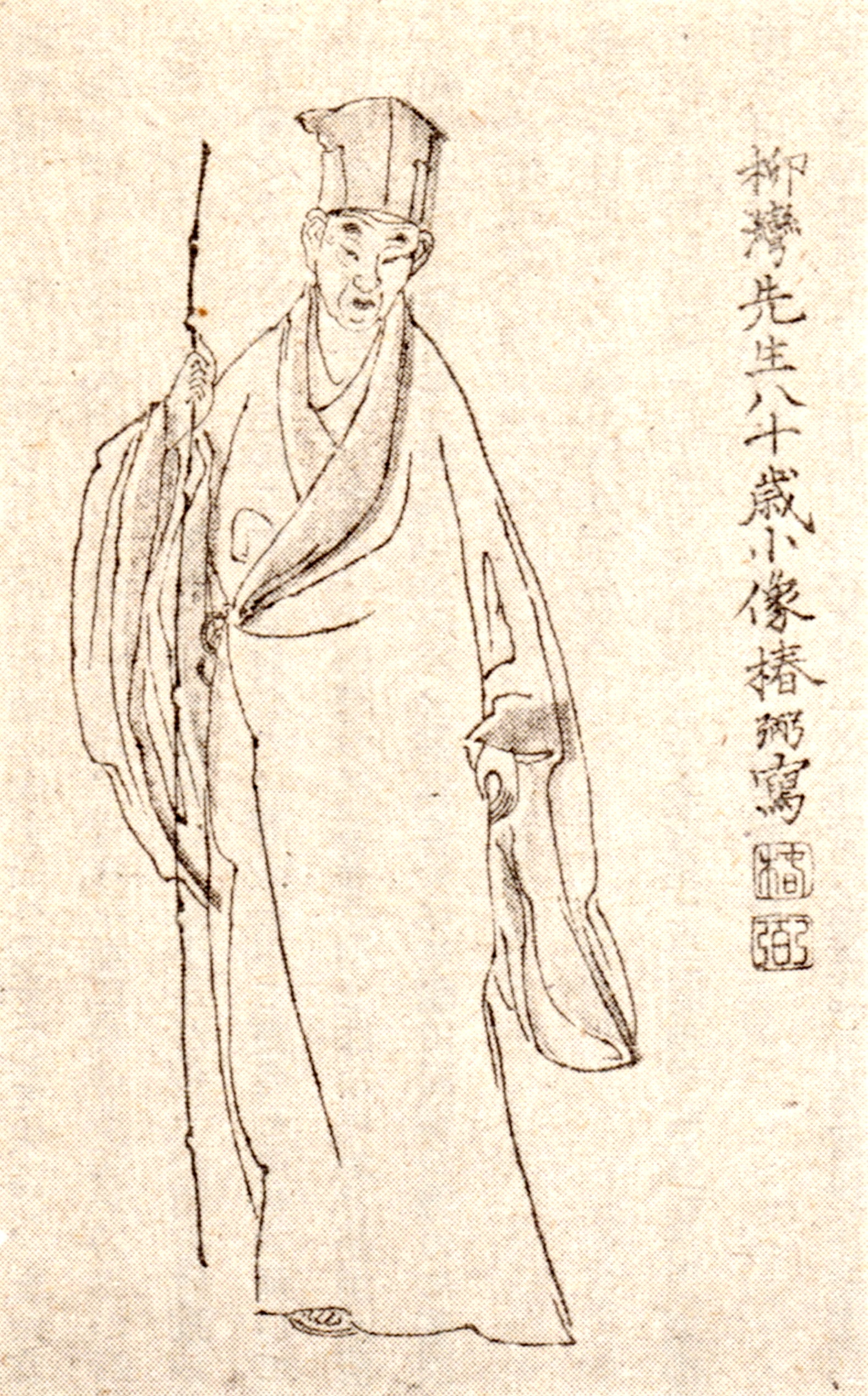 椿椿山・筆、江戸時代の漢詩人・館柳湾の肖像画。雑誌『書苑』（三省堂、昭和16年刊）より。